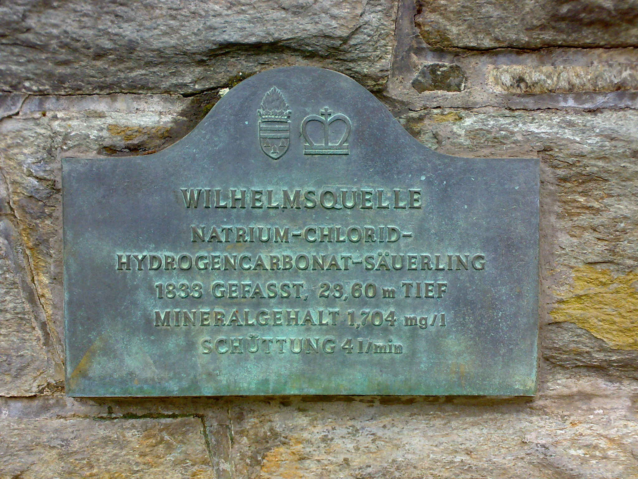 Quellenpark Kronthal, Wilhelmsquelle